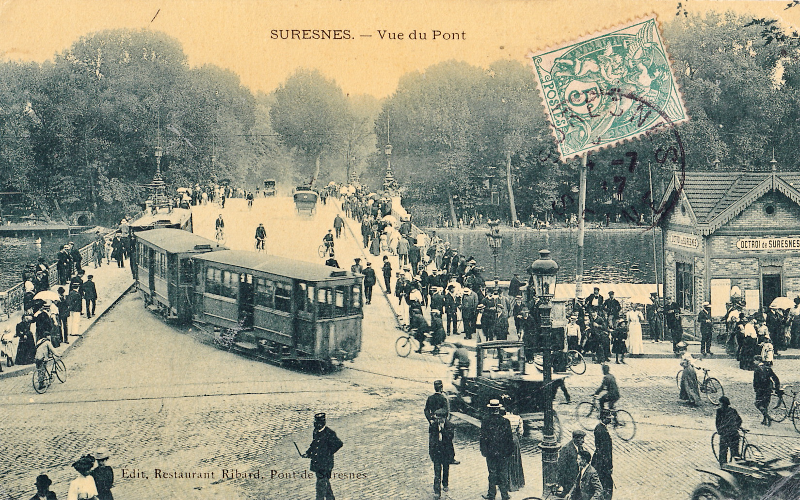 Carte postale ancienne éditée par le restaurant Ribard au Pont de Suresnes :SURESNES - Vue du Pont en direction du Bois de Boulogne.A droite: octroi de Suresnes.